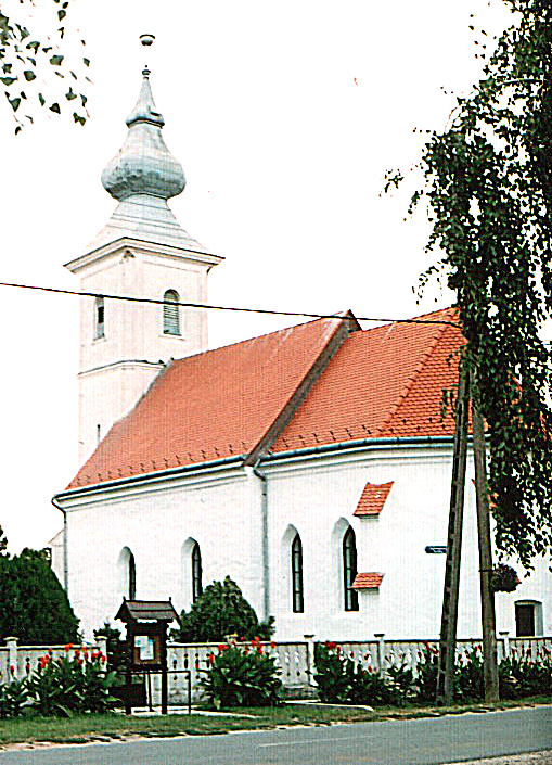 Református templom, Tiszakóród